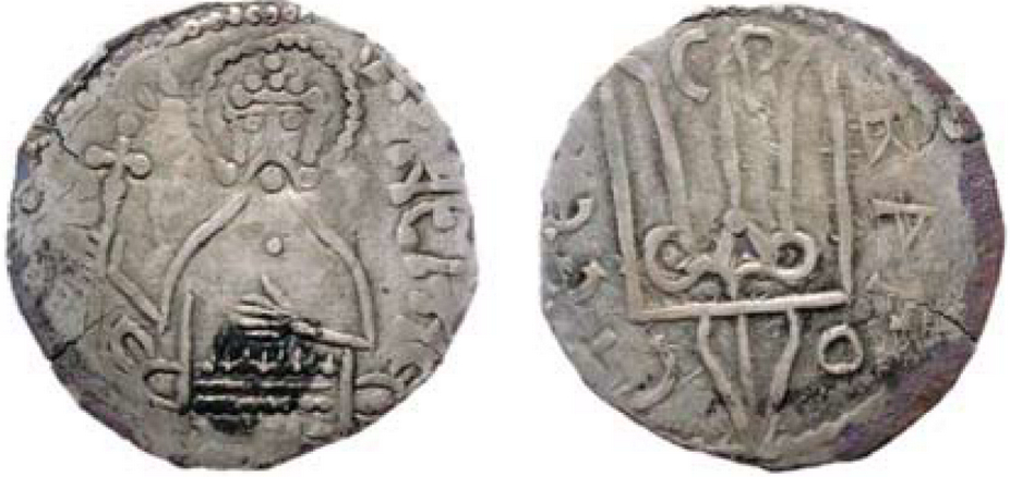 Срібляник Володимира Великого (тип II)